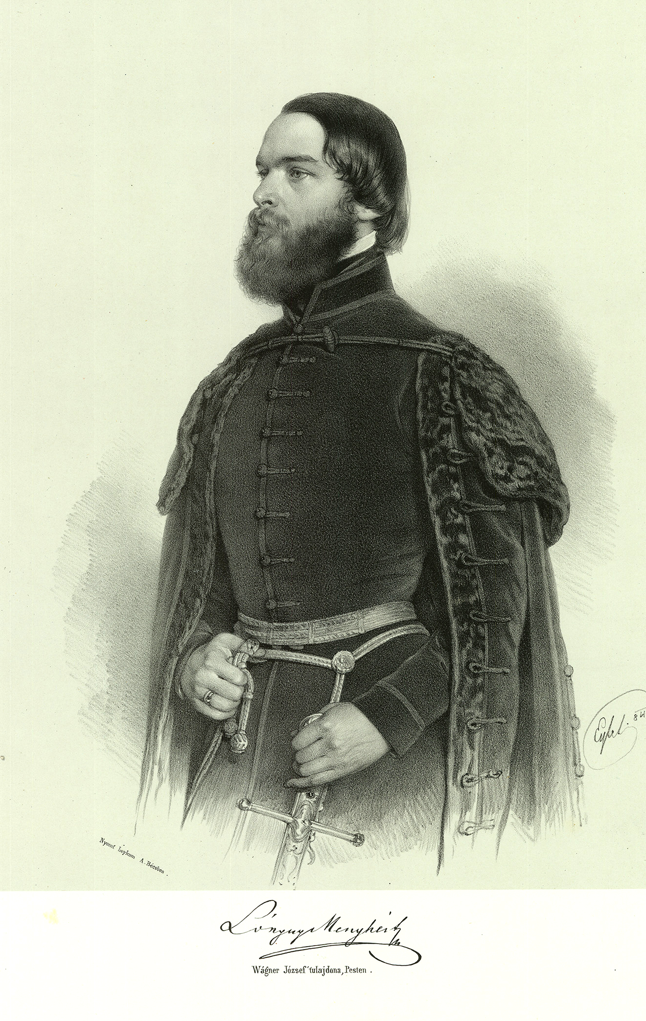 Dr. nagylónyai és vásárosnaményi gróf Lónyay Menyhért (Nagylónya, Bereg vármegye, 1822. január 6. – Budapest, 1884. november 3.) politikus, miniszterelnök, publicista, a Magyar Tudományos Akadémia tagja, elnöke